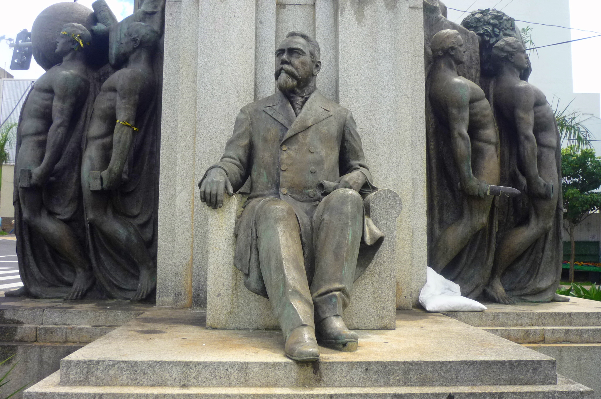 Monumento em homenagem a Campos Sales